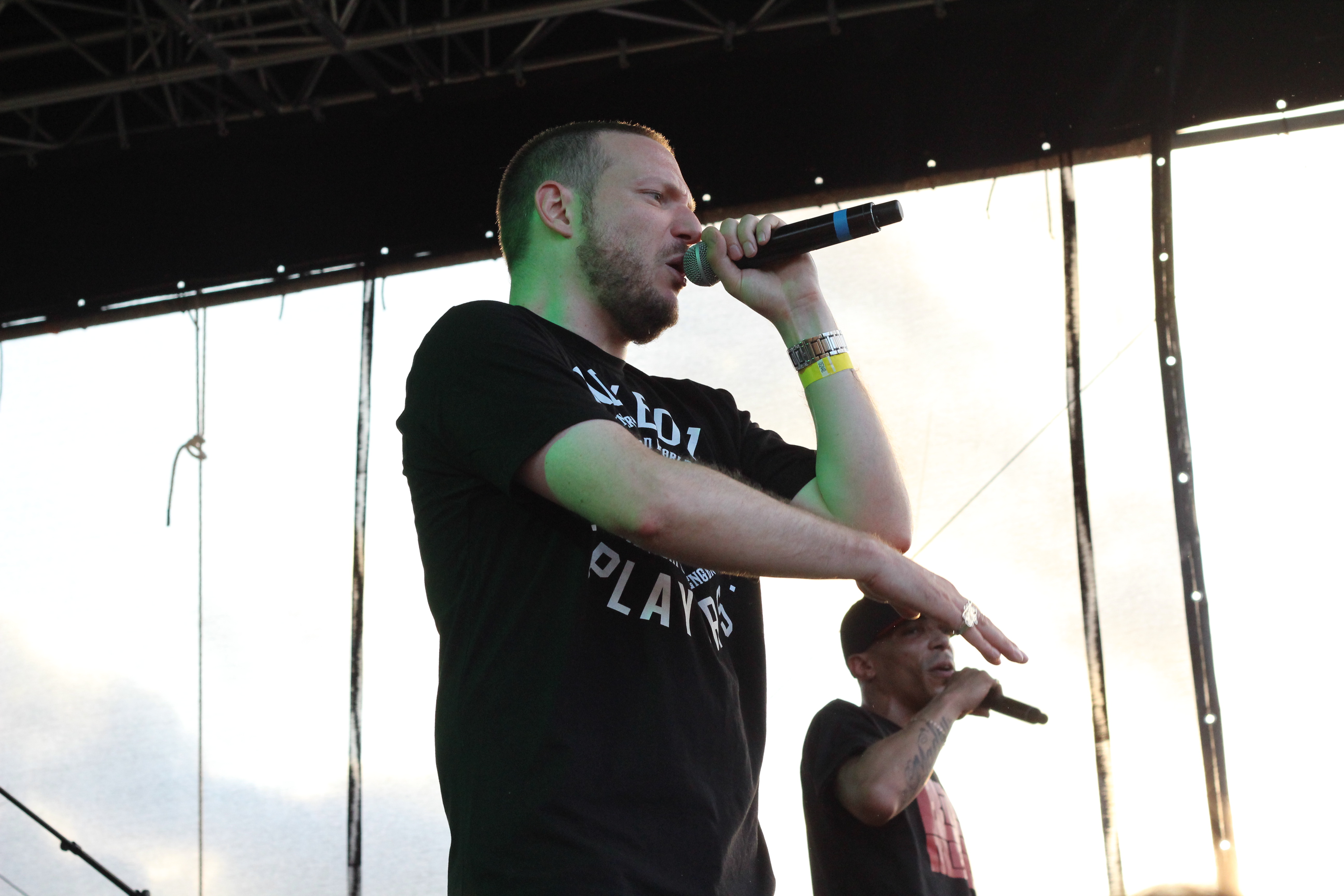 LUN1K/Némir/Flynt à LaPlage de Glaz'Art, le 4 juillet 2013 pour le Paris Hip Hop Festival !